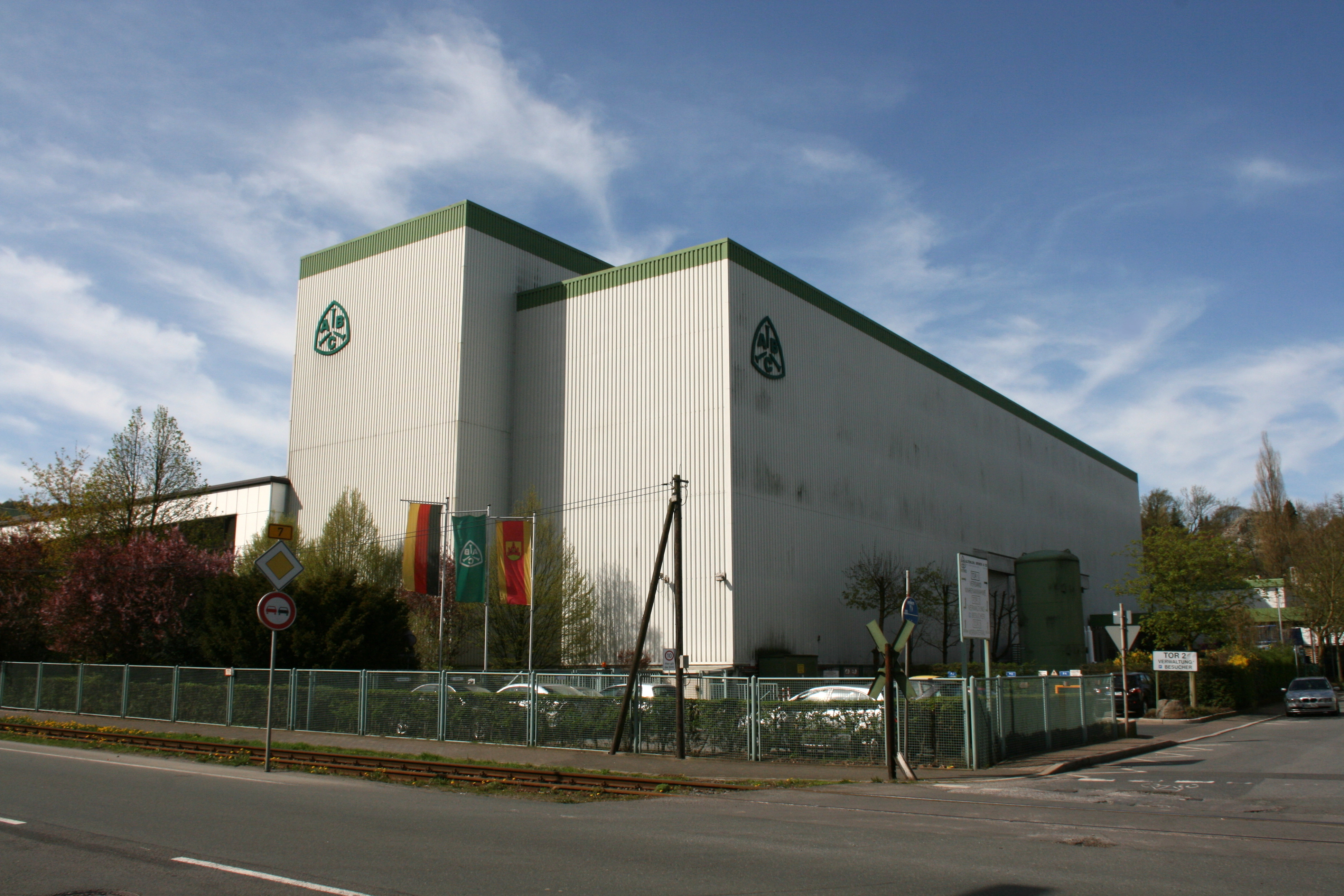 Altenloh, Brinck & Co, Zweigwerk an der Kölner Straße in Gevelsberg